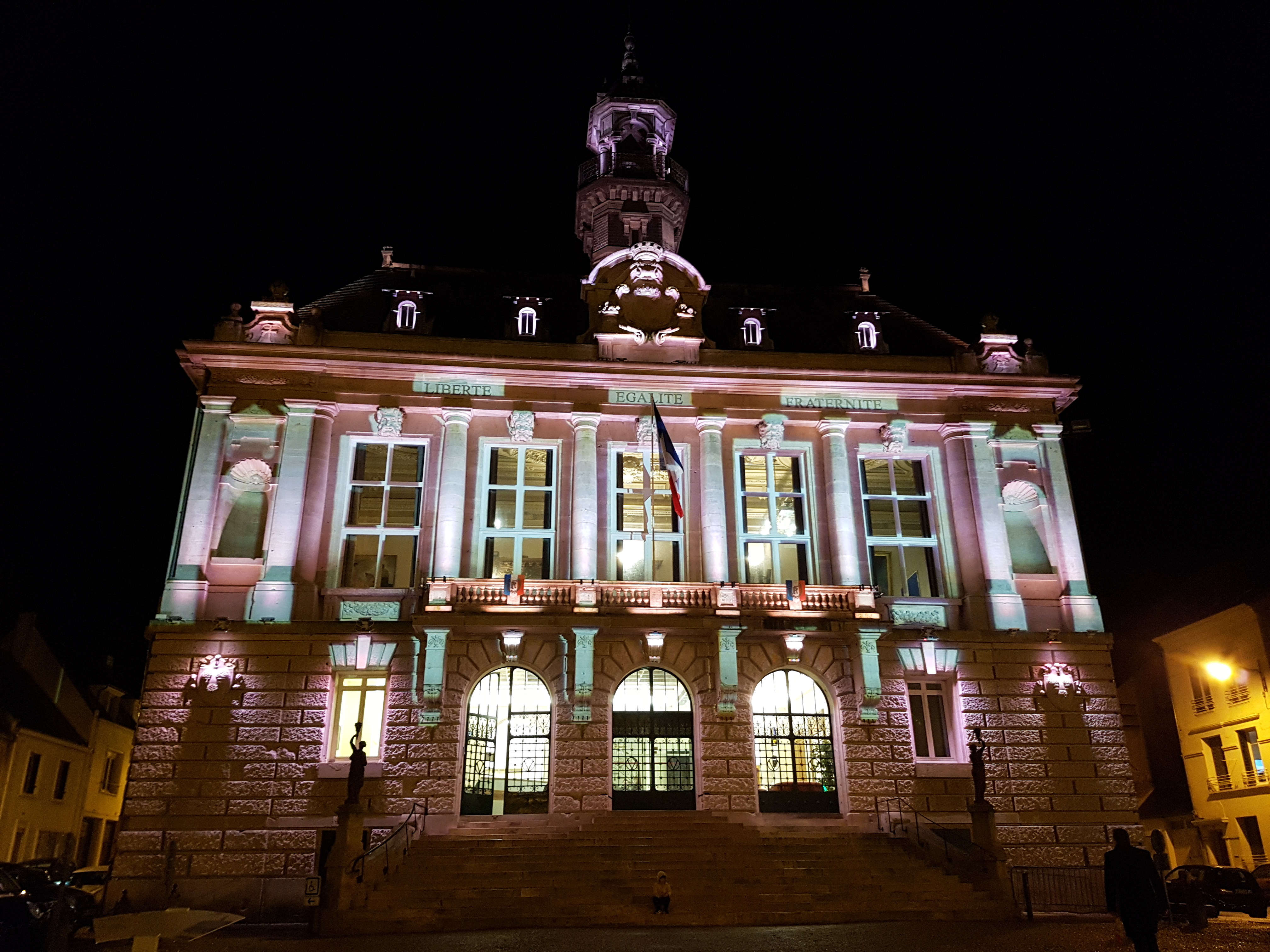 Mairie de Vernon.